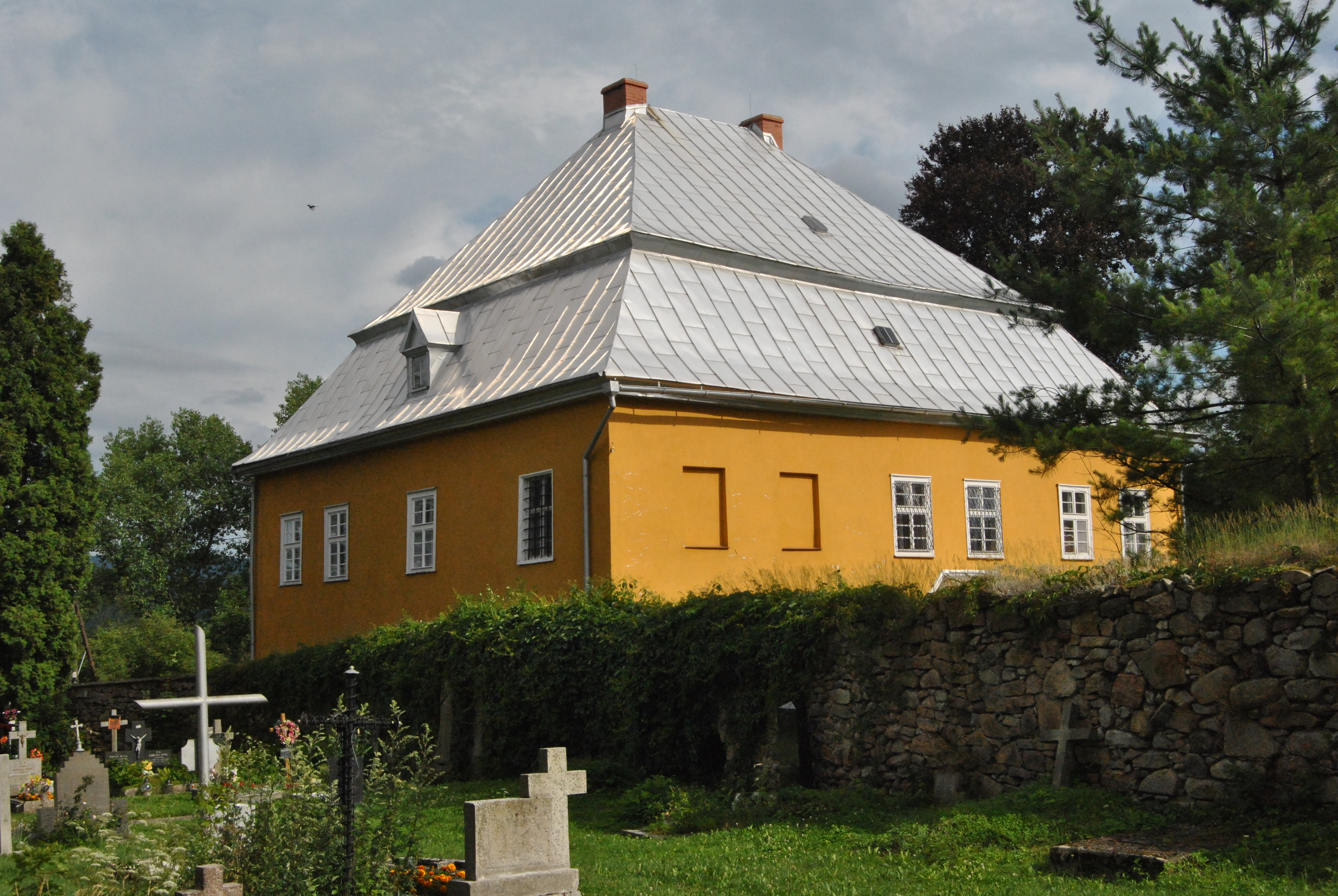 Łomnica, pastorówka, ob. dom mieszkalny, 1752